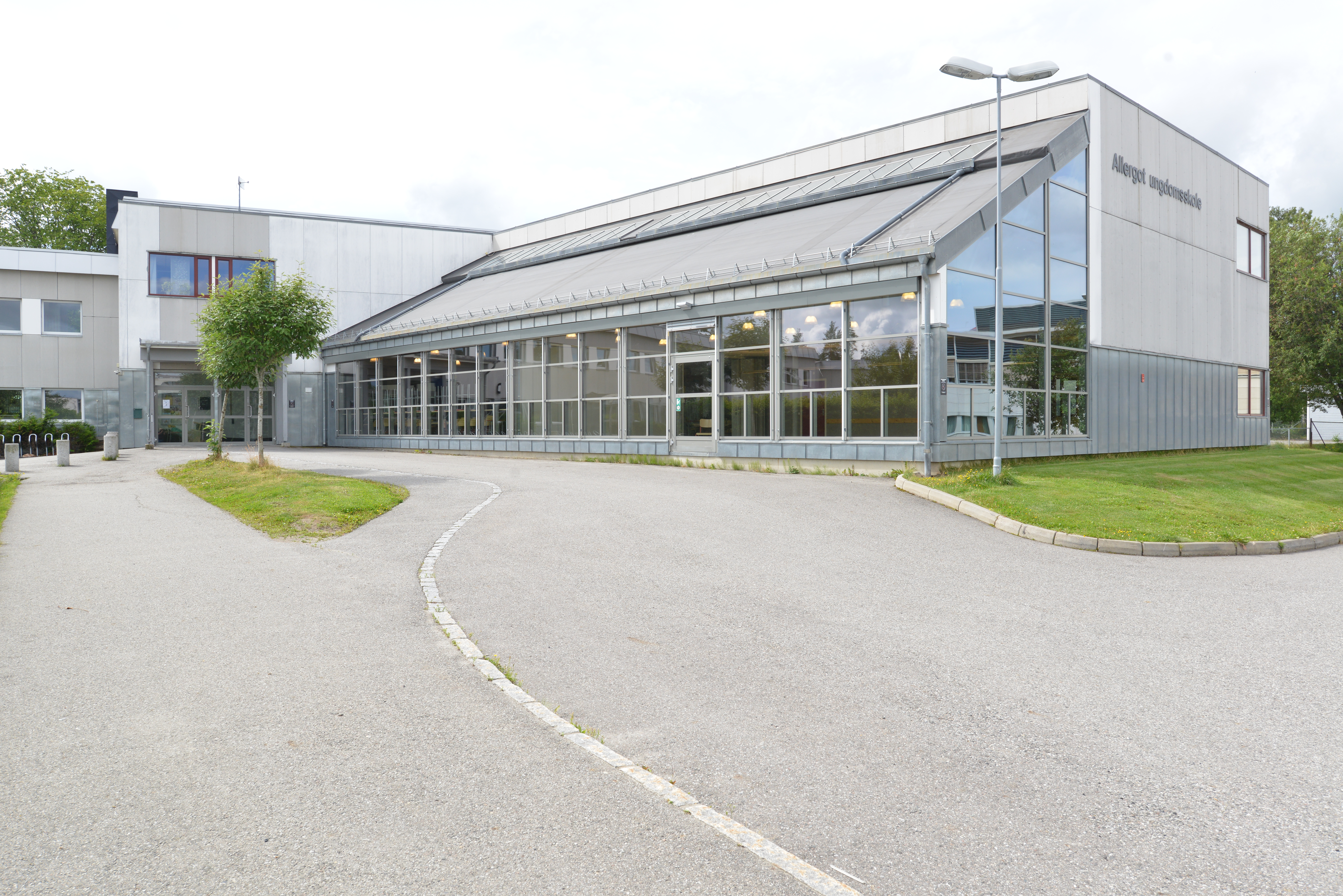 Allergot ungdomsskole på Jessheim